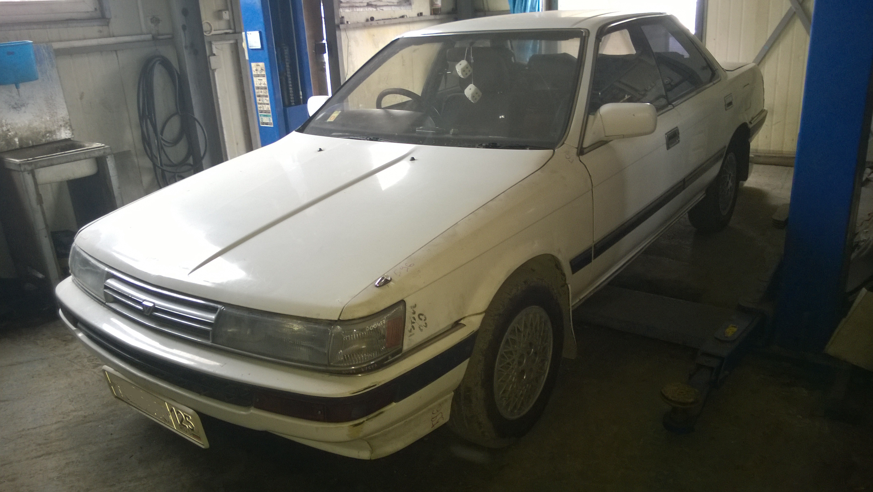 TOYOTA Vista SV21